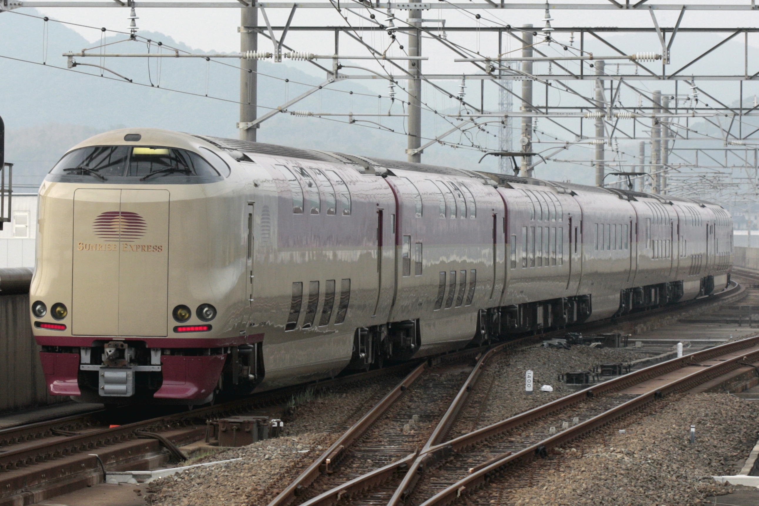 285系サンライズ瀬戸 茶屋町駅にて撮影